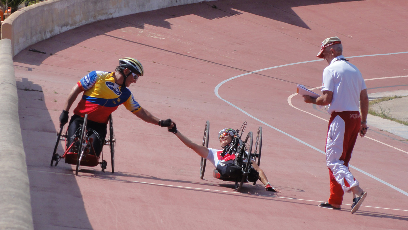 Schwaller mit Trainer René Savary und Meinrad Müller